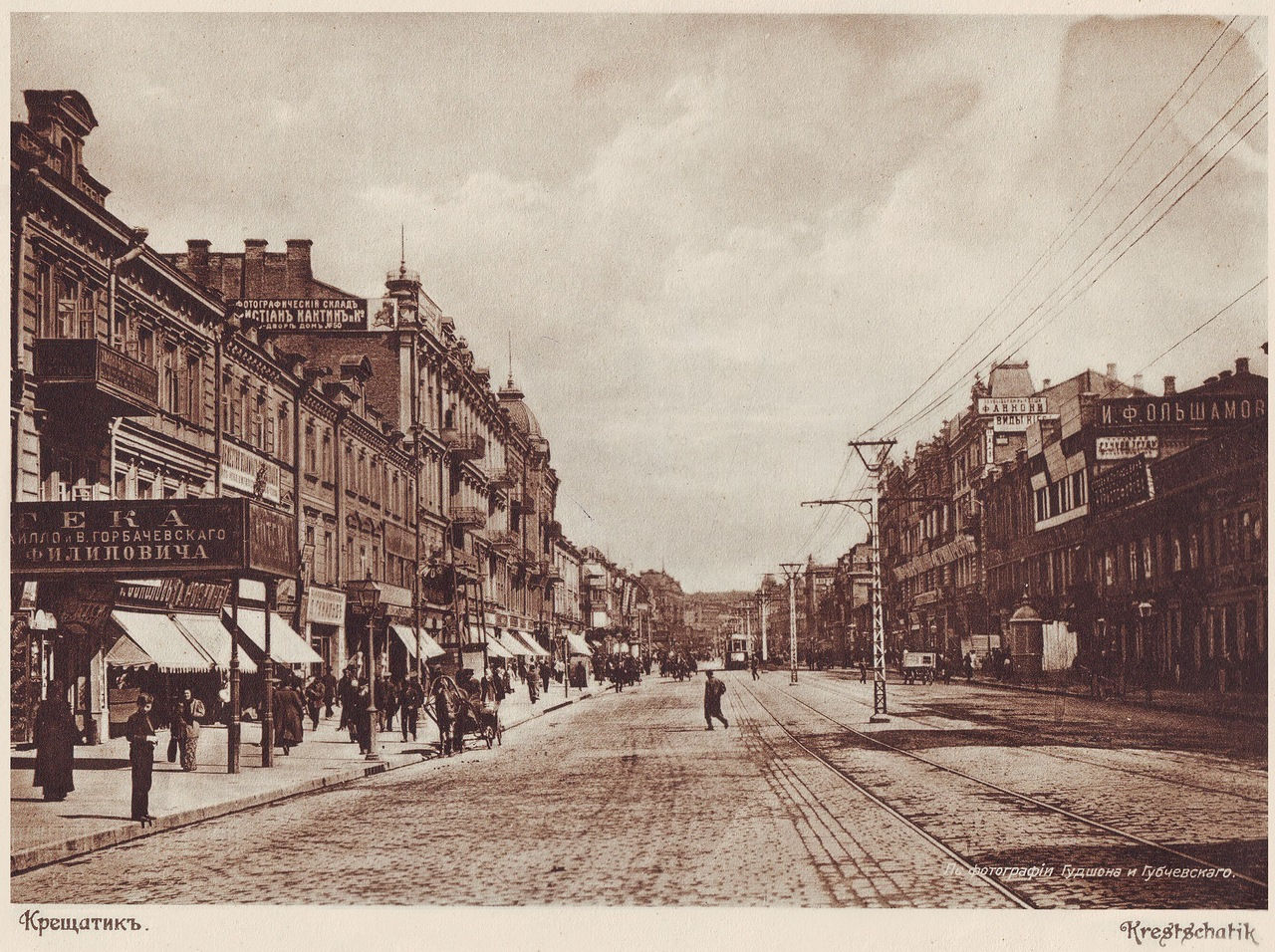 Хрещатик Київ 1911